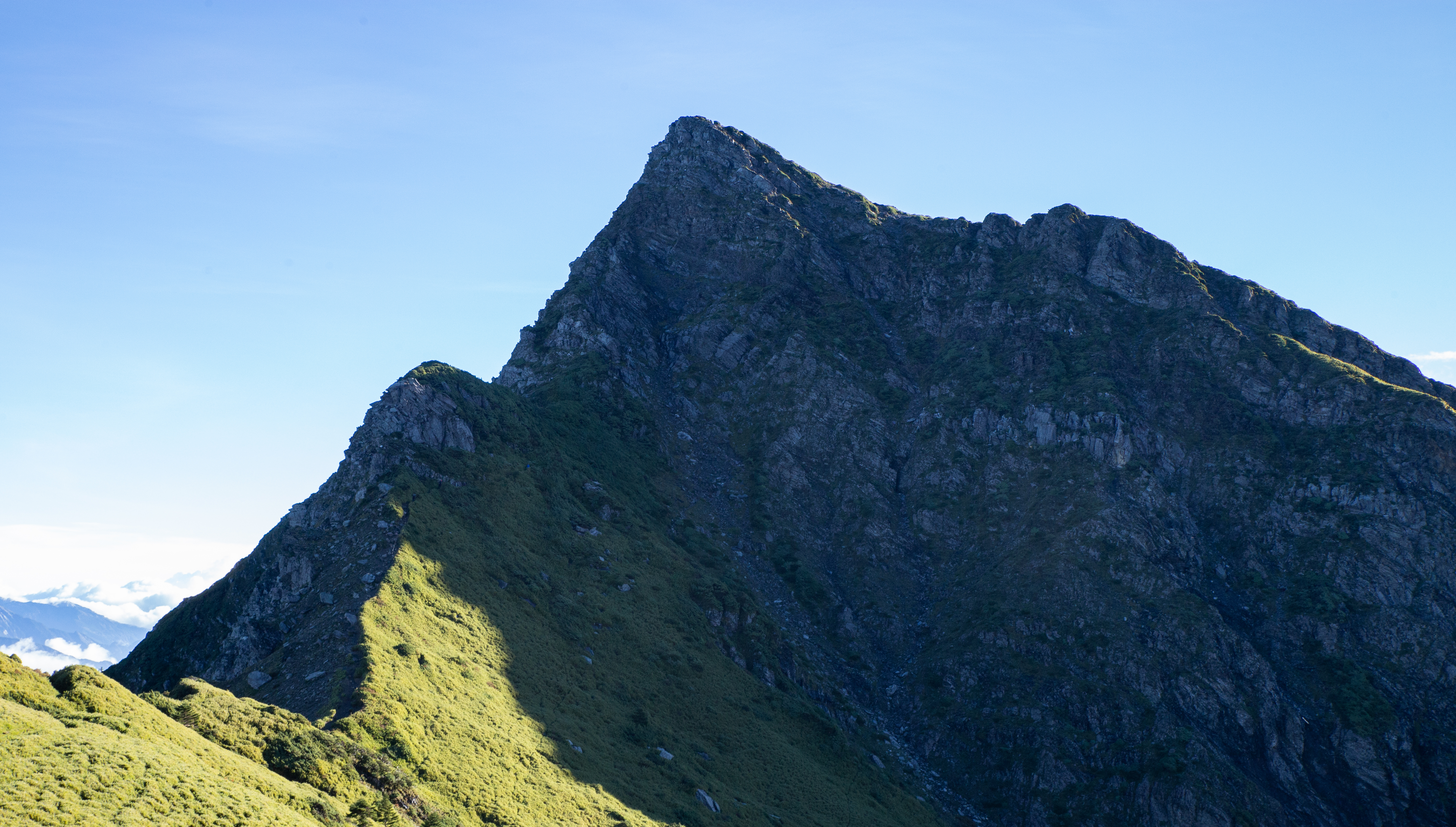 奇萊北峰南面